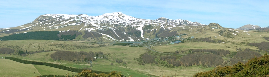 Puy de Sanca Südsäit.